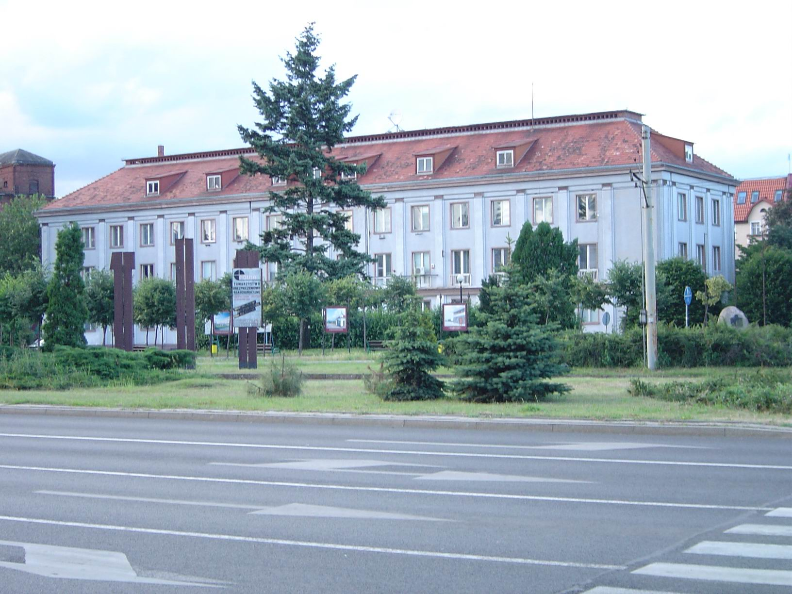 Starostwo powiatowe w Grudziądzu